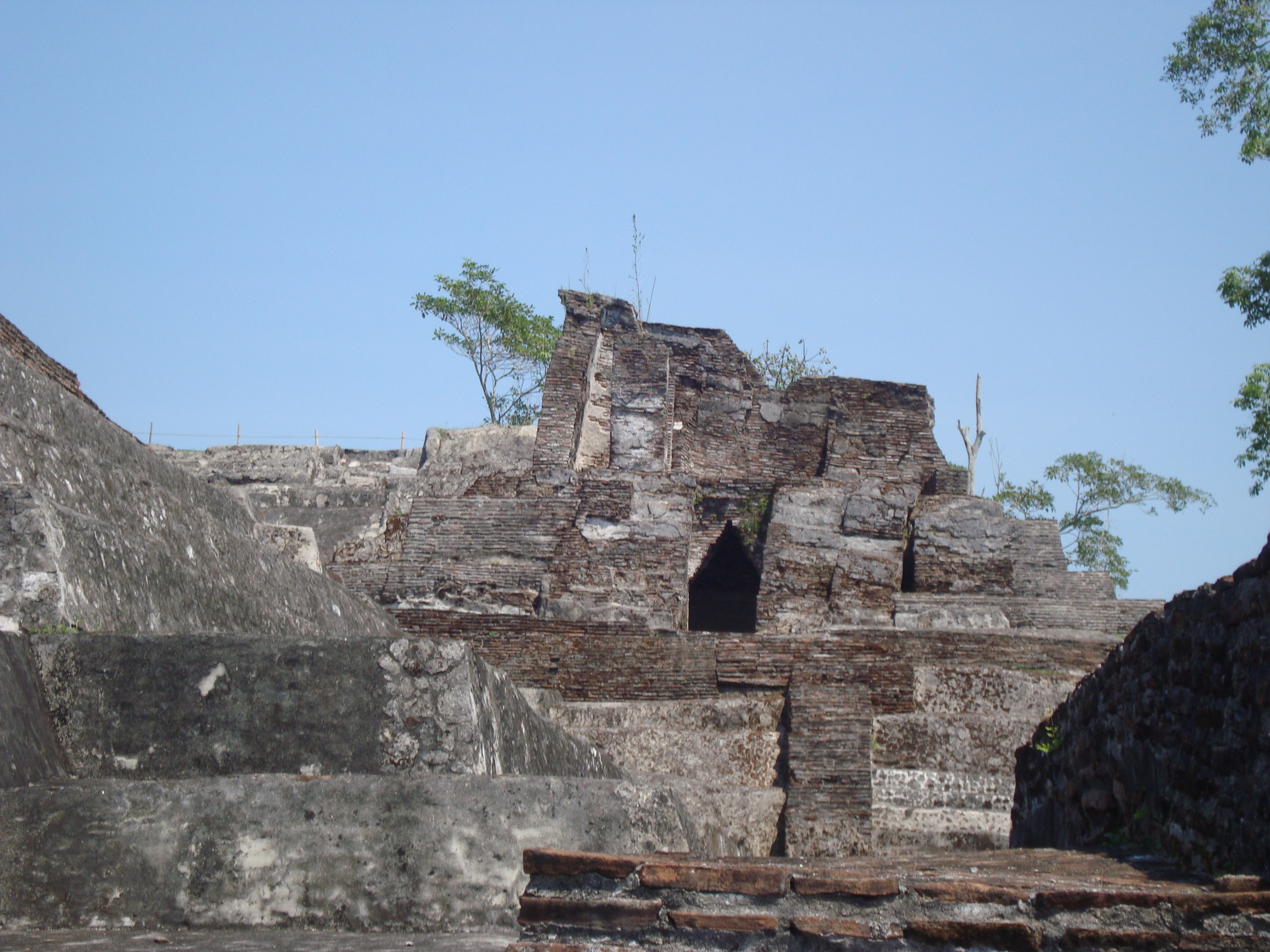 Acercamiento del Templo IV de la zona arqueológica de Comalcalco. Tabasco. México.